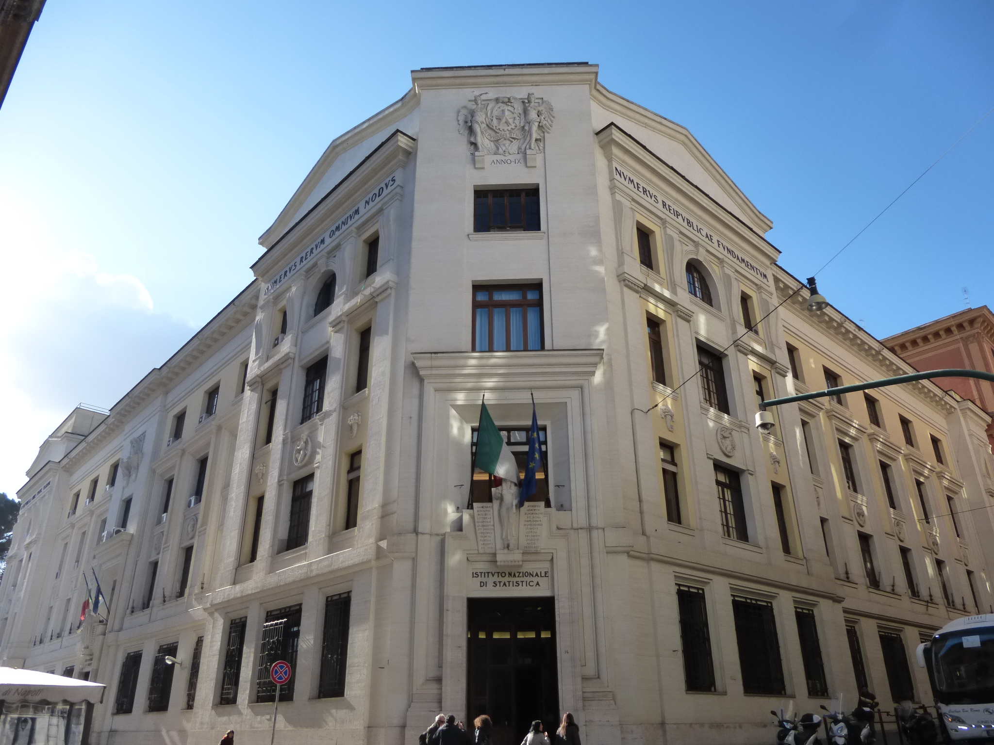 Roma, palazzo ISTAT all'angolo via Balbo - via Depretis (1931)